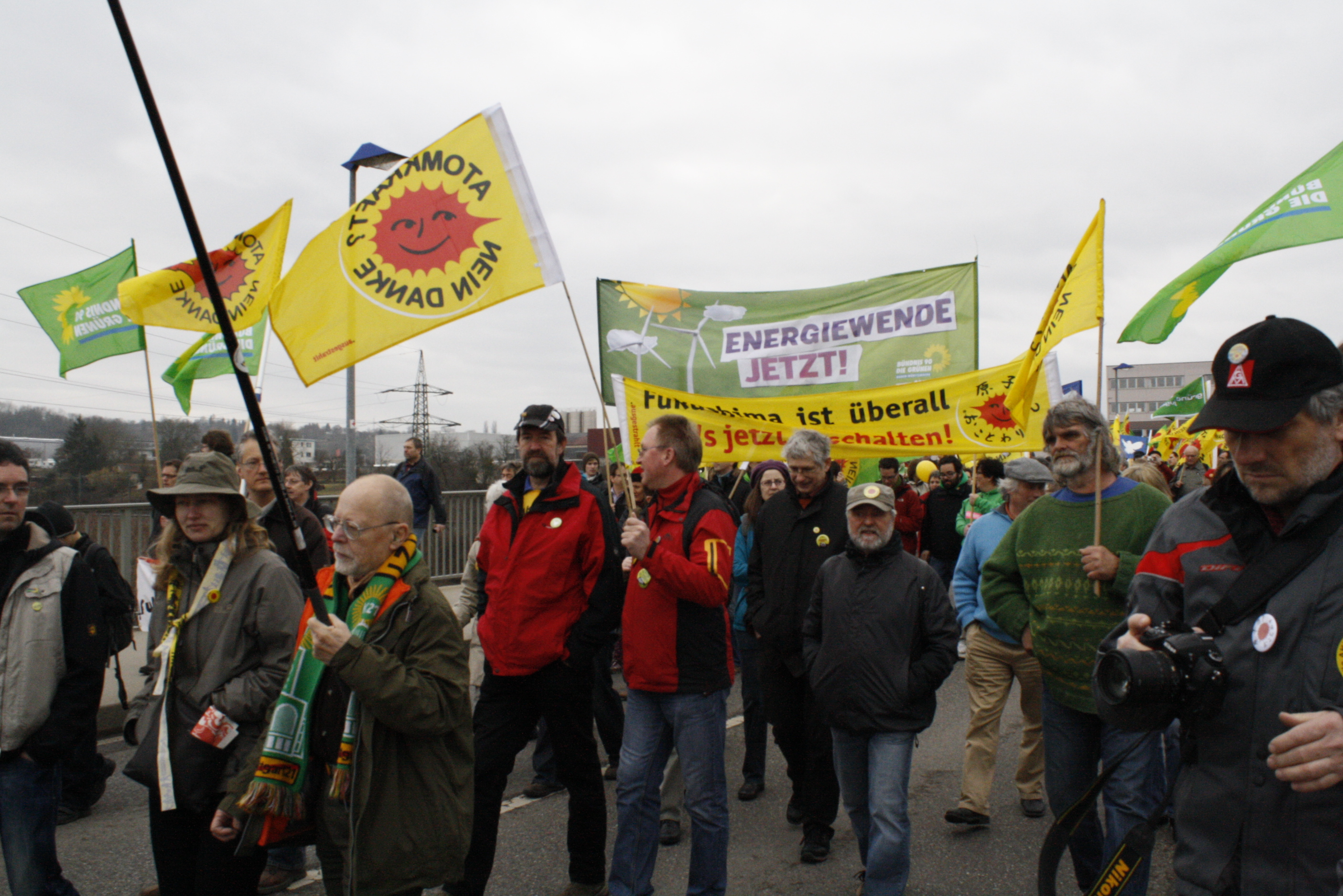 Energiewende jetzt! - Demo in Neckarwestheim am Jahrestag der Katastrophe in Fukushima